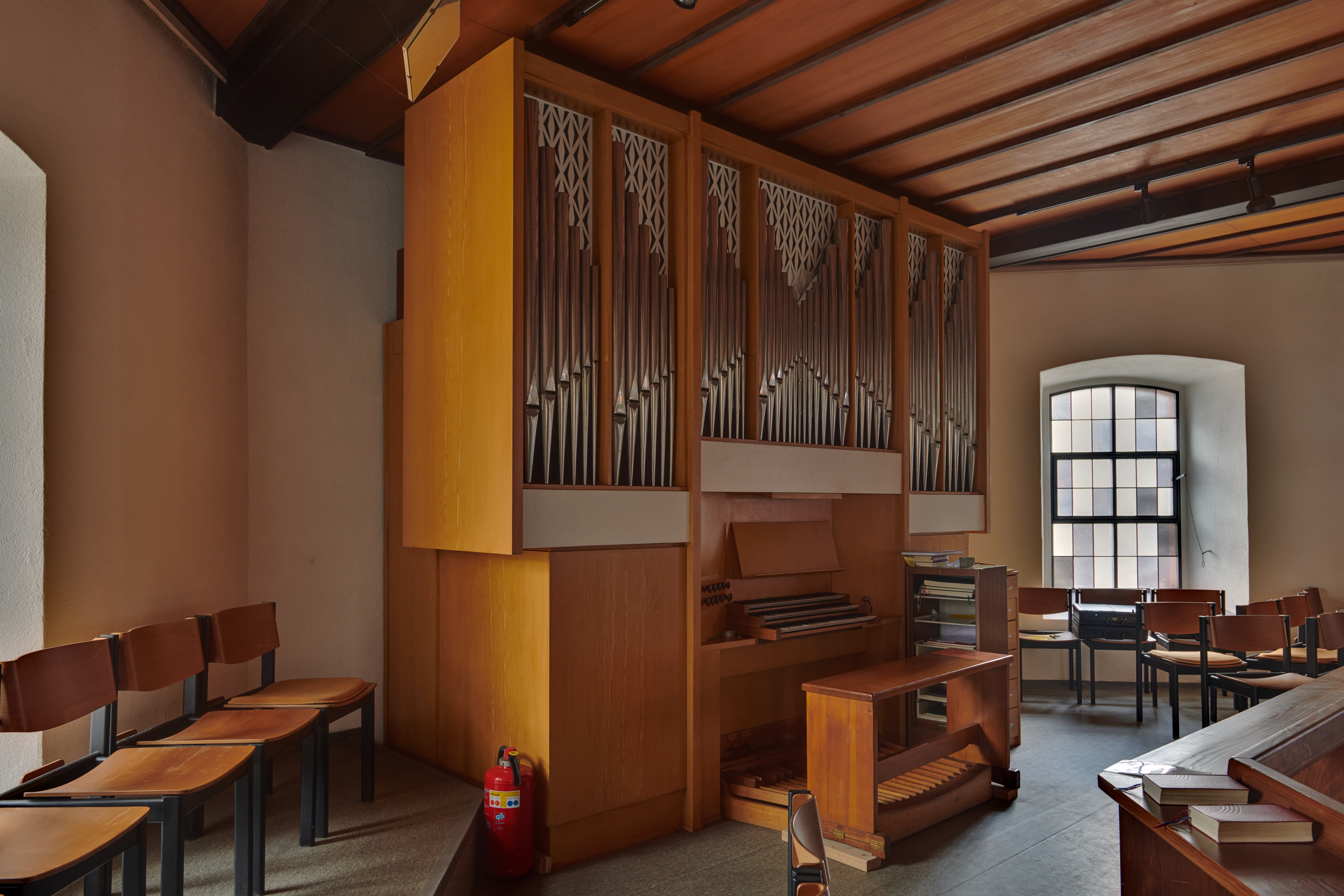 Hauinger Kirche: Orgel